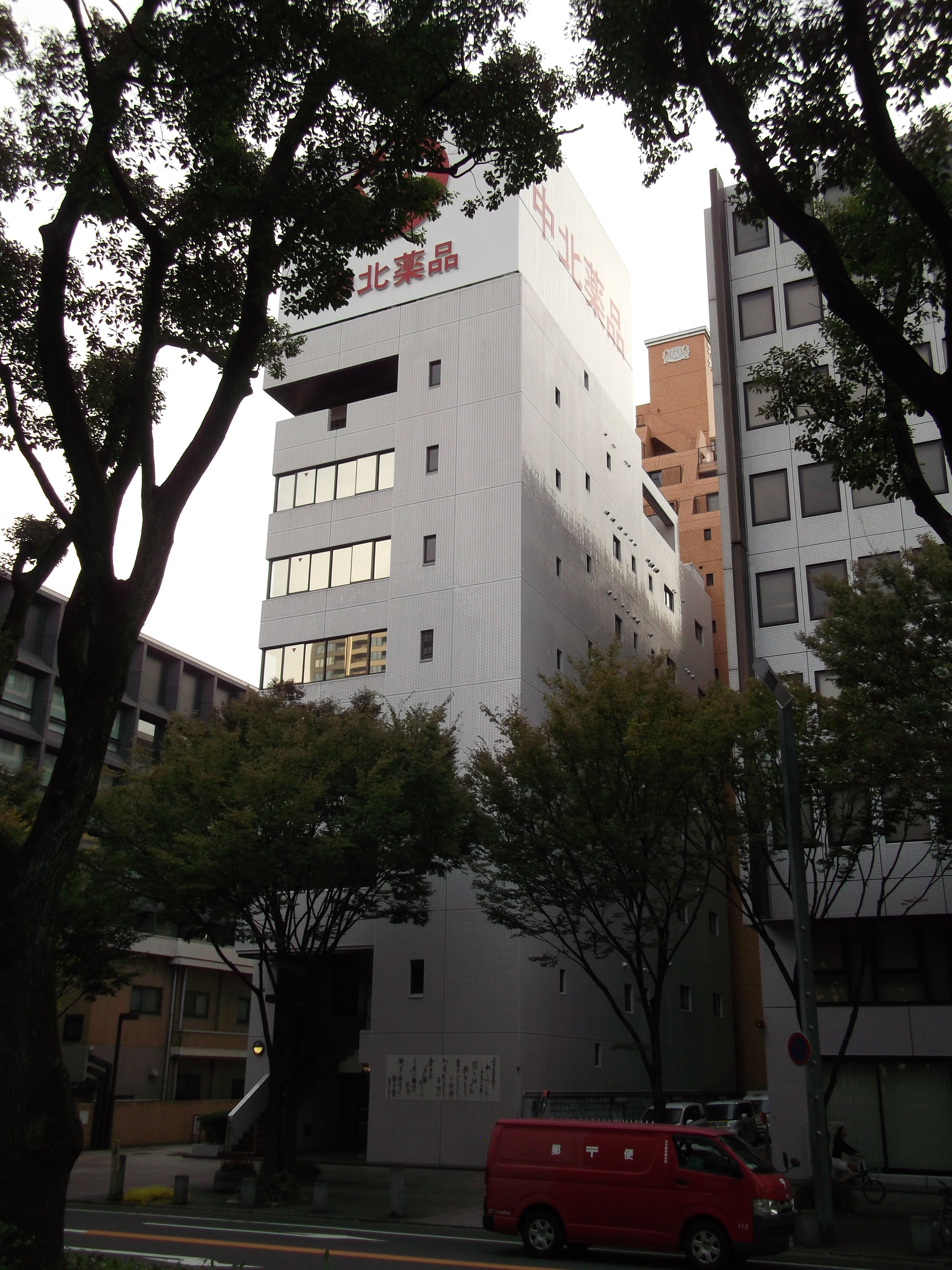 名古屋市中区の中北薬品本社を東側公道（久屋大通）北側より撮影